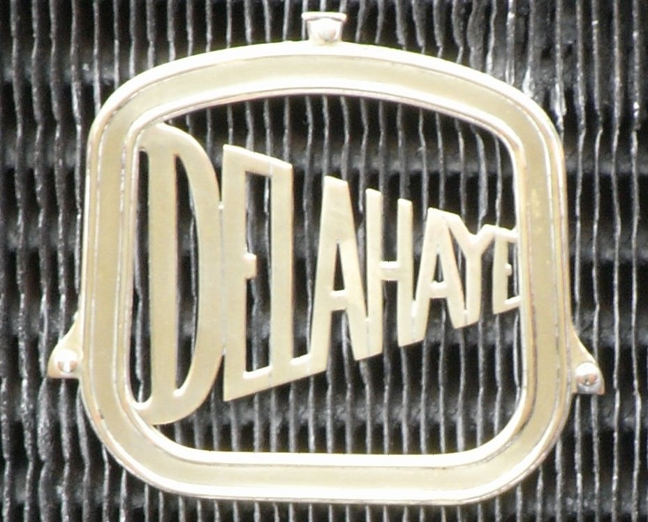 Logo de la marque Delahaye sur véhicule autopompe incendie.